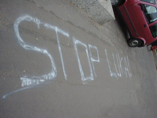 Napis skierowany przeciwko przywódcy Białorusi Alaksandrowi Łukaszence, namalowany przed ambasadą Białorusi na ul. Ateńskiej Warszawie w 2002 roku.